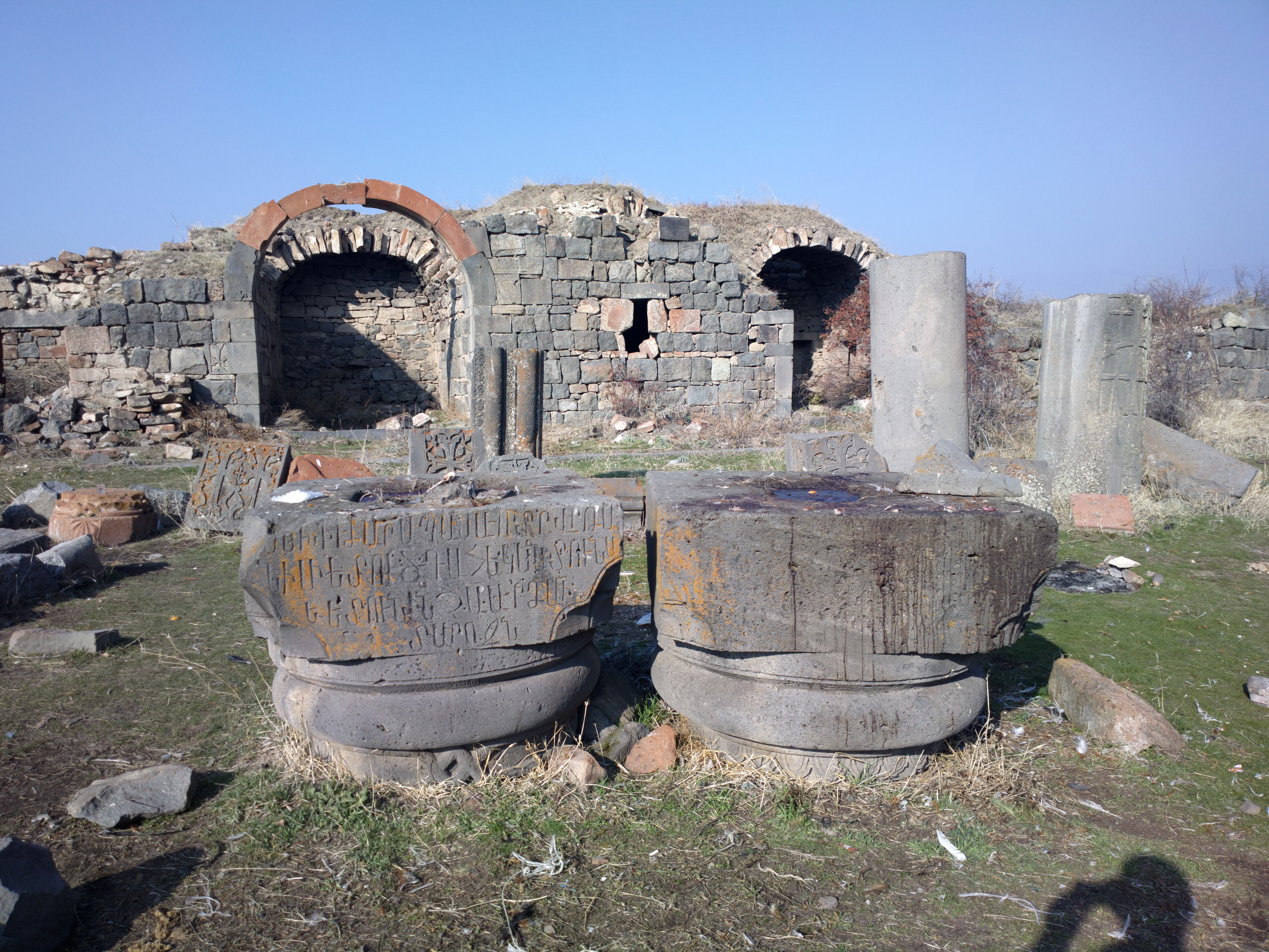 Հավուց Թառ 99.4/3